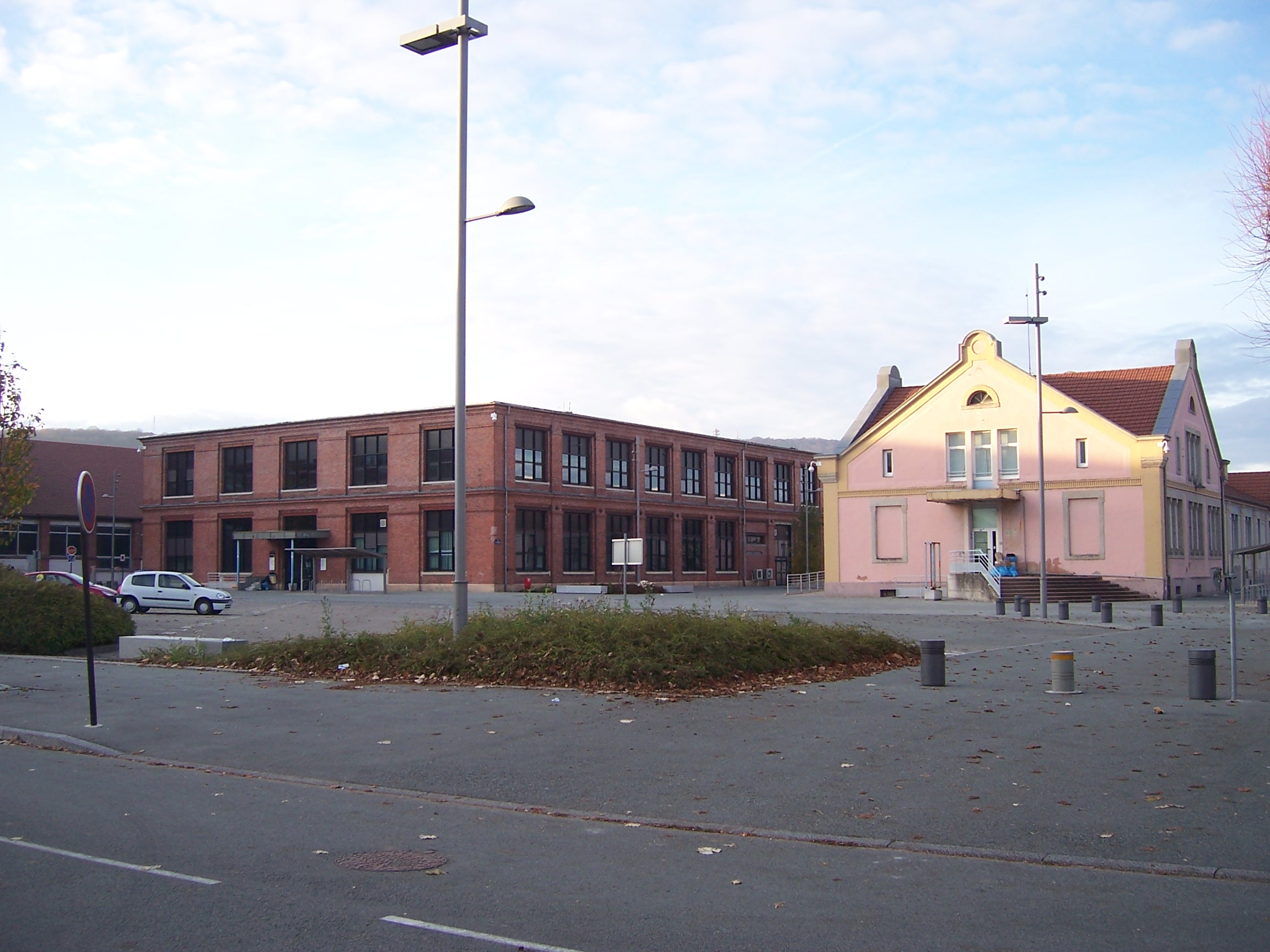 Bâtiments sur la technopole de Belfort.